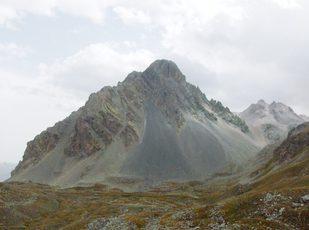 Rocca Bianca (Valle Maira) - il versante NO visto dal Vallone dell'Infernetto